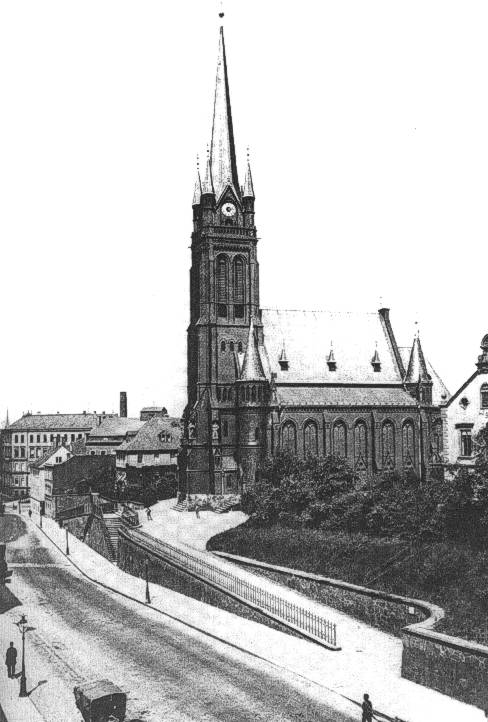 St. Nikolaikirche (Chemnitz), Aufnahme um 1900